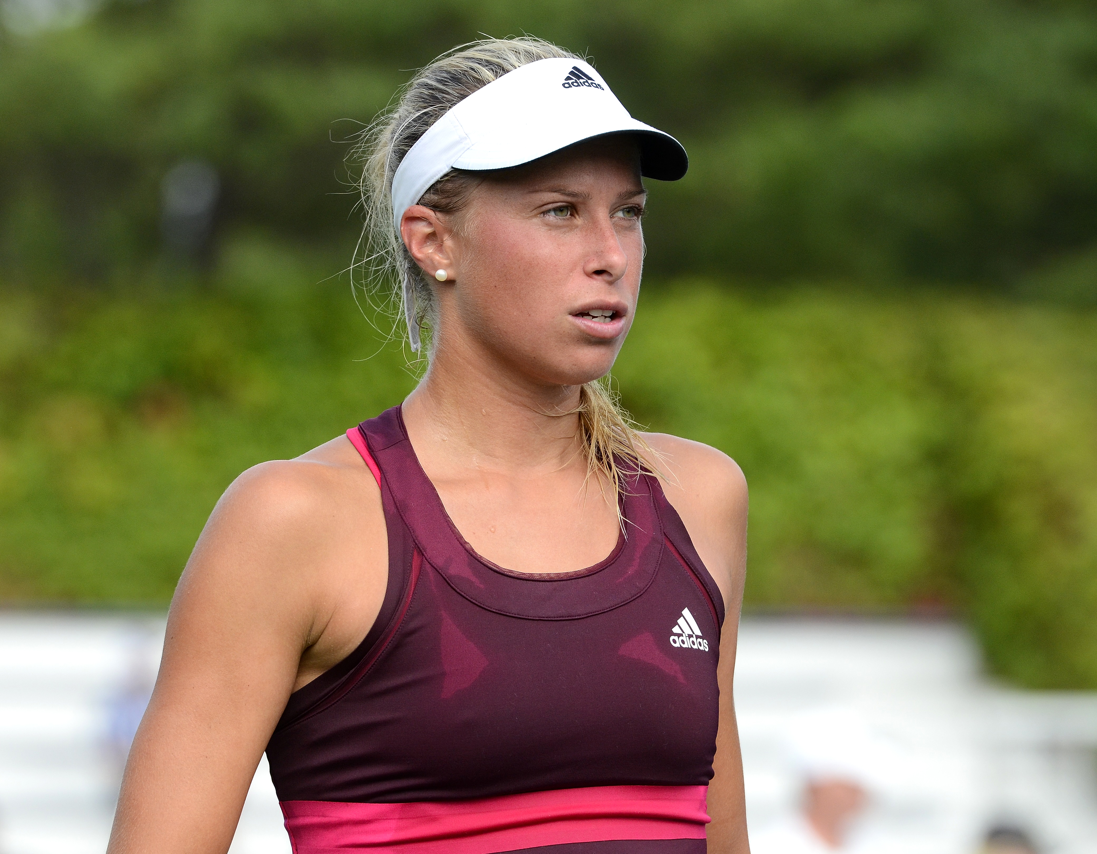 August 21, 2014 Queens, NY Ksenia Pervak (RUS) def. Andrea Hlavackova (CZE)